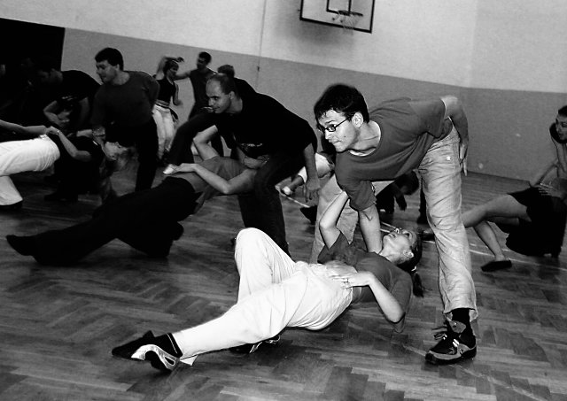 Figura v Salse. Foto z Letní prázdninové taneční školy 2005 v Pelhřimově, pořádané Taneční školou Hes.